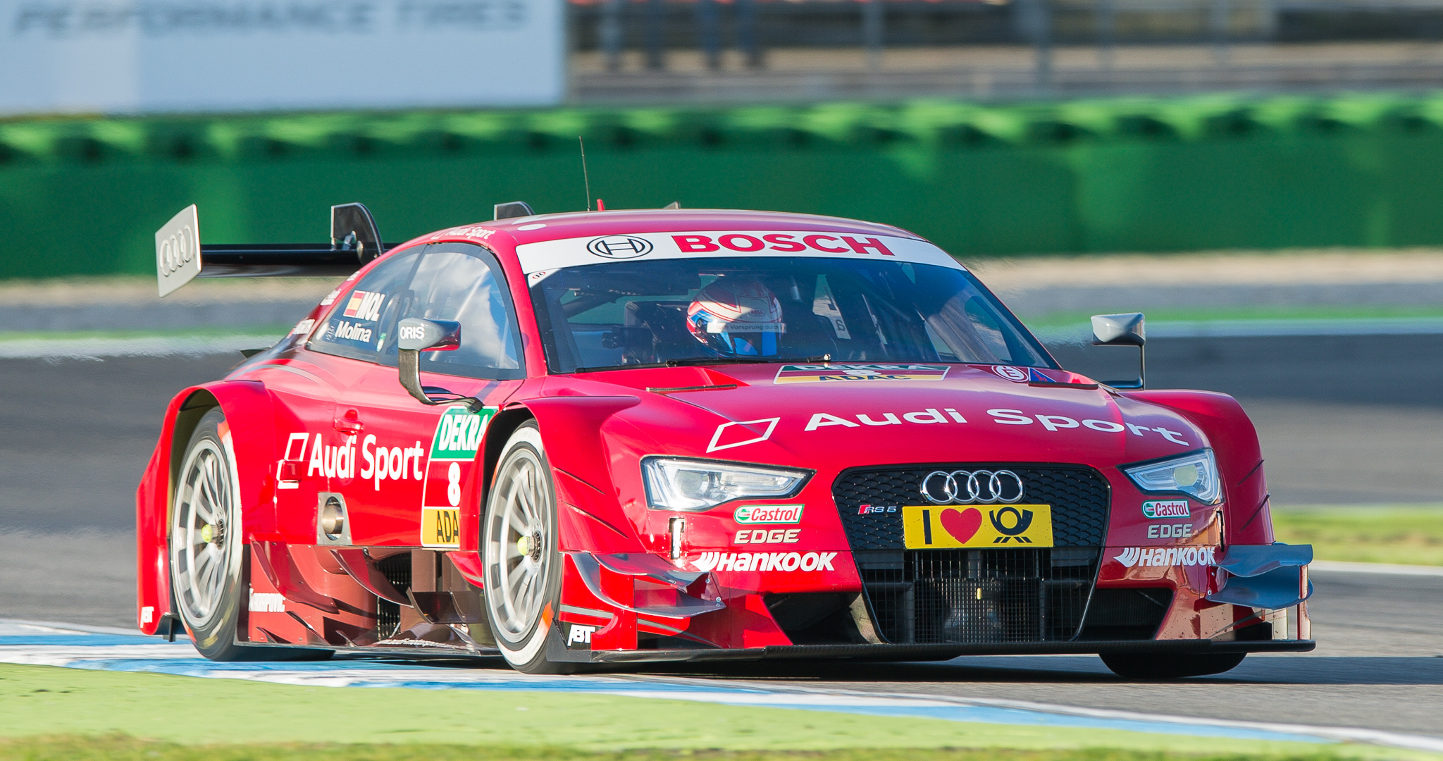 Abt Sportsline GmbH,Audi Sport Audi RS 5 DTM,DTM,Deutsche Tourenwagen Masters,Hockenheimring,Miguel Molina,Motorsport